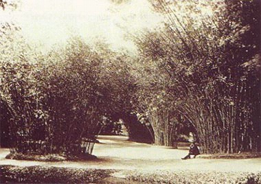 Rio de Janeiro Botanic Garden (Jardim Botânico do Rio de Janeiro) - Brazil - 1890